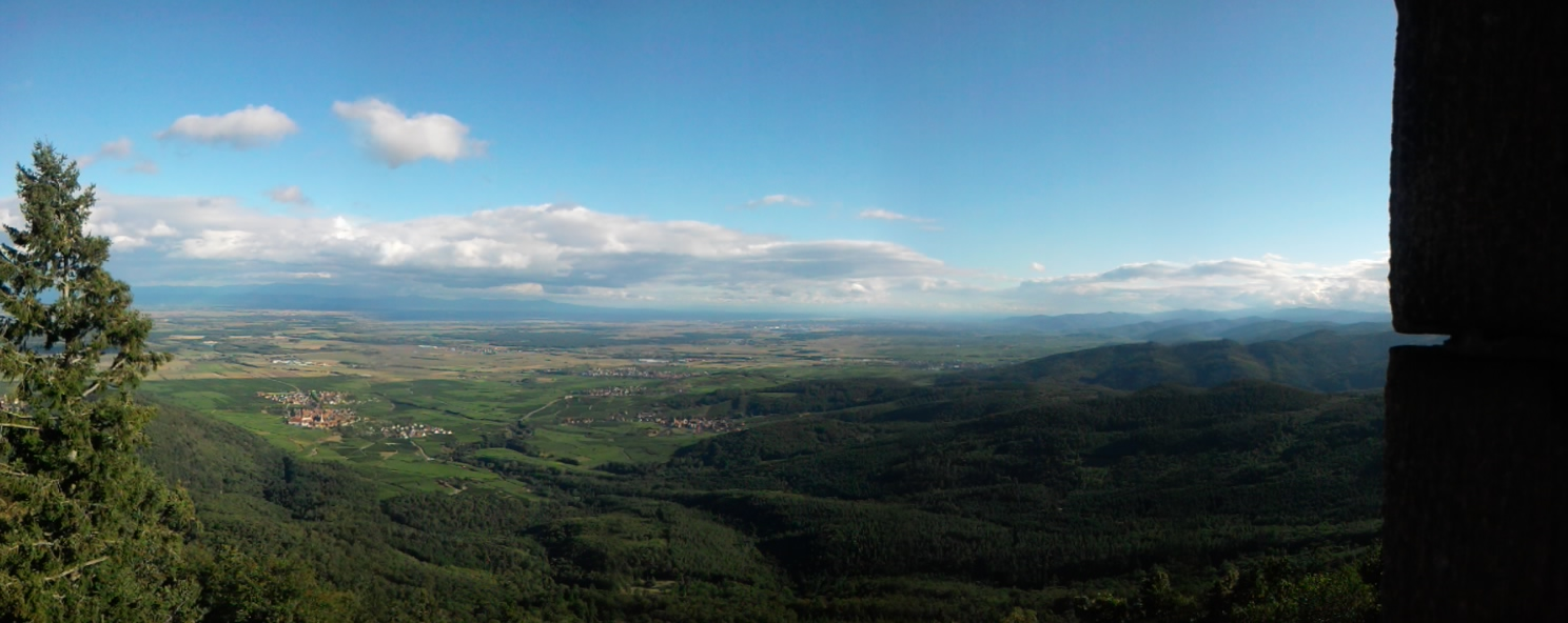 Kilátás az elszászi Kœnigsbourg várából.